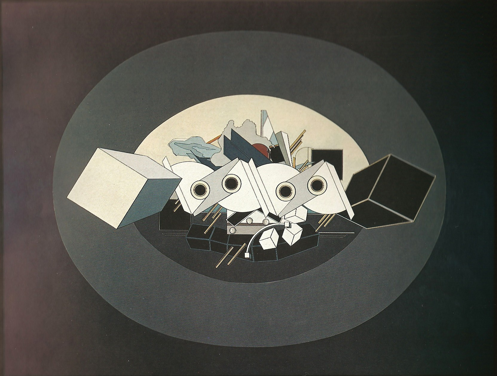 Huile sur toile, Alain Le Yaouanc, 180 cm sur 237 cm (collection particulière)